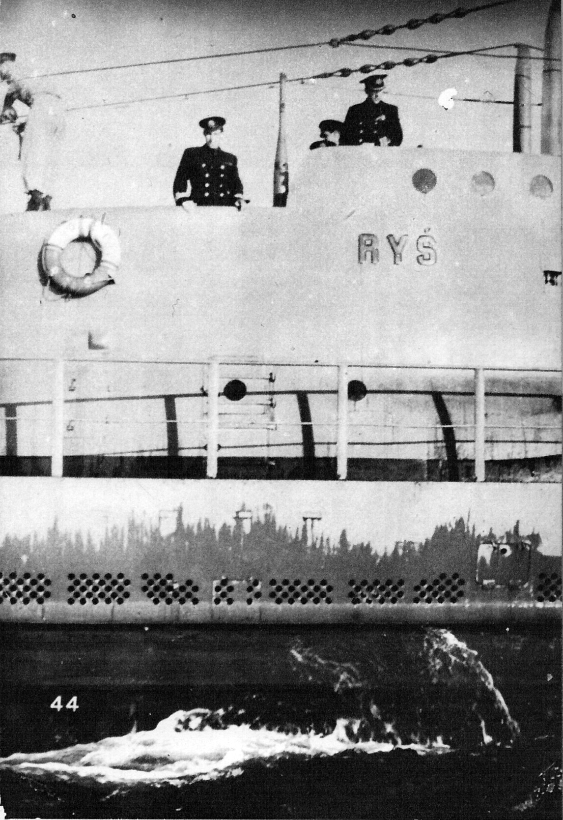 Okręt podwodny ORP "Ryś" w okresie powojennym